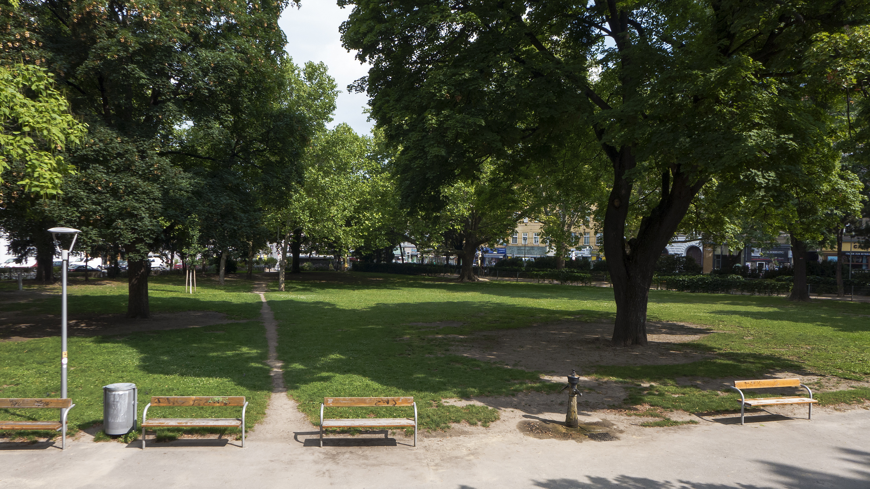 Arne-Carlsson-Park in Wien 9